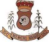 Brasão da cidade de Engenheiro Navarro